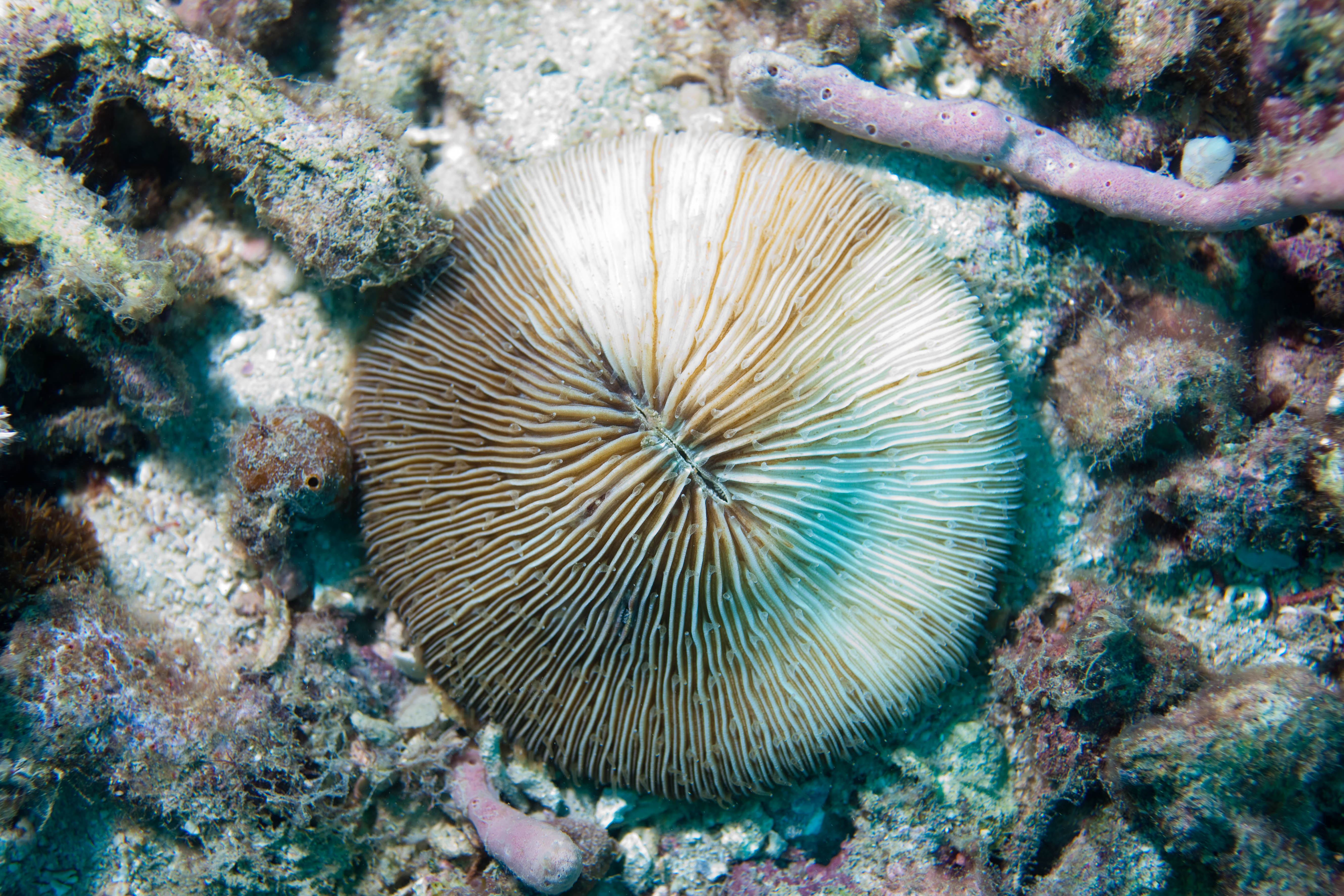 Fungia concinna - coral